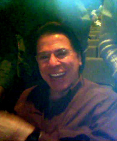 O empresário e apresentador de televisão brasileiro Sílvio Santos no Teatro Abril em São Paulo.